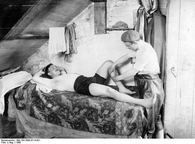 Berlin, Radrennfahrer Bruno Demke Steglitz. Hinter den Koulissen der Rennbahn. Vor dem Dauerrennen: Ein Rennfahrer (Bruno Demke) wird in seiner Kabine massiert. [Berlin-Steglitz.- Radrennfahrer Bruno Demke bei Massage] Abgebildete Personen: Demke, Bruno: Radrennfahrer, Deutschland